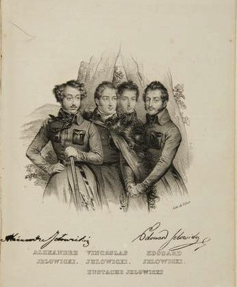 Famille d'insurgents de Podolie